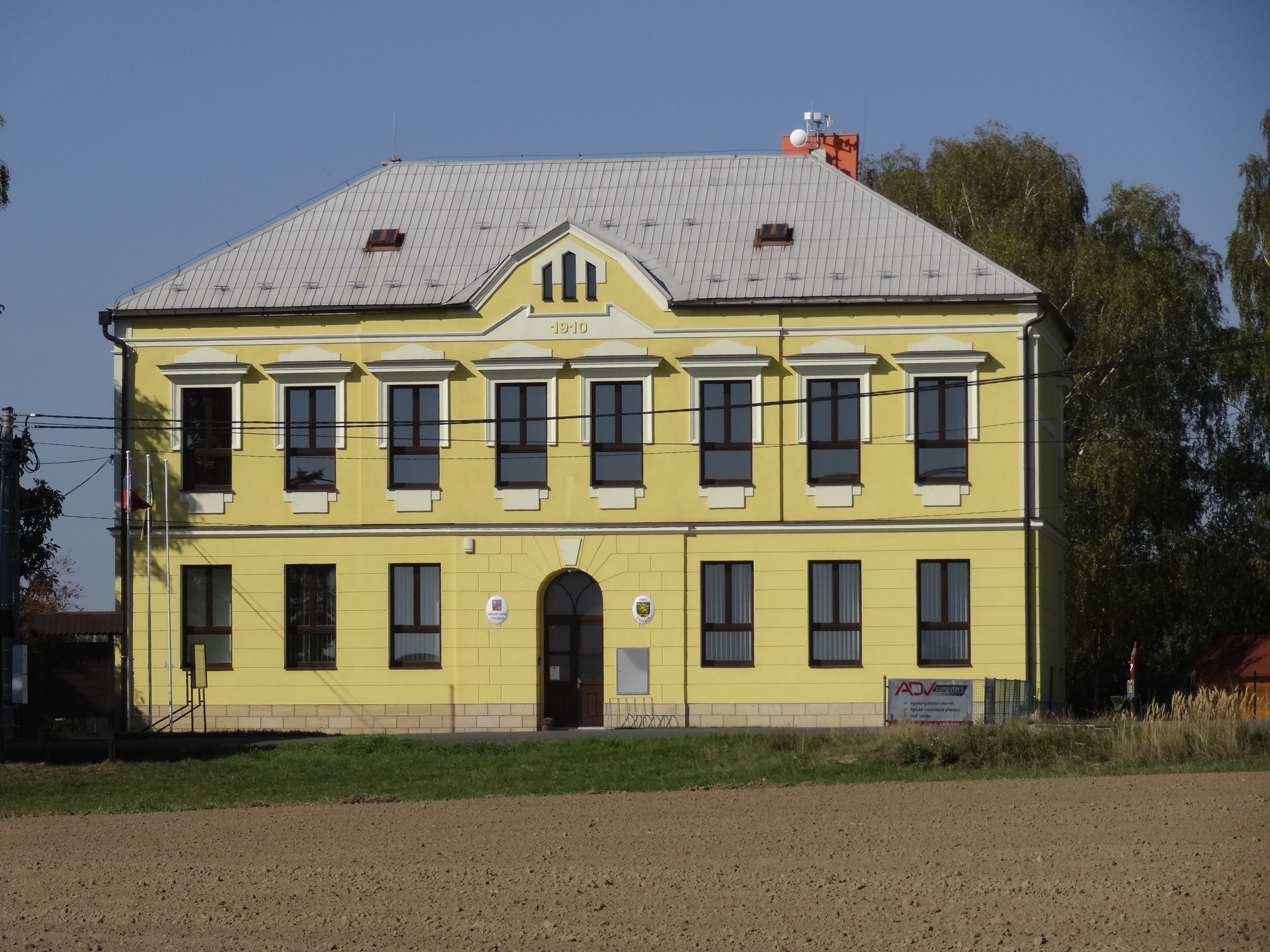 Čtveřín - bývalá škola čp. 95, dnes obecní úřad